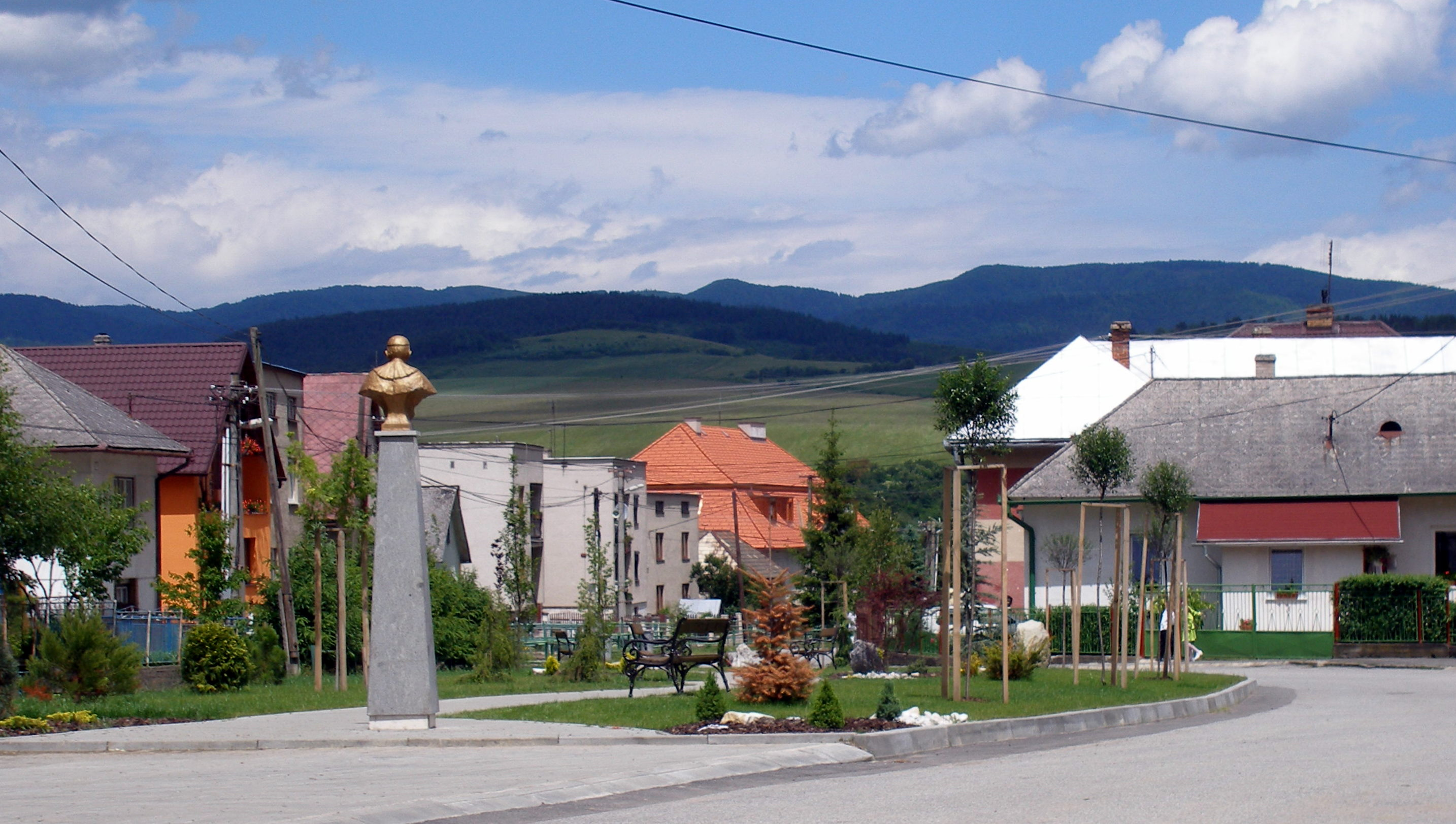 Obec Rožkovany okres Sabinov